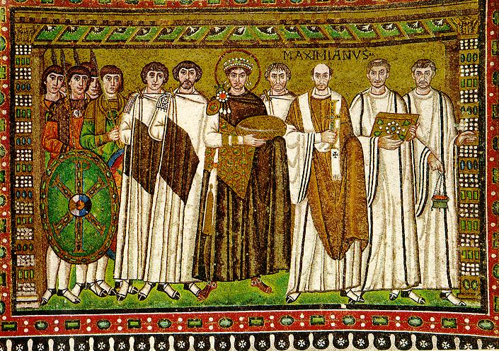 Mosaïque de la basilique de Saint-Vital à Ravenne. L'empereur byzantin Justinien se trouve au centre (sa tête est auréolée) à la gauche du centre se trouve le général Bélisaire à la droite du centre se trouve l'eunuque et général Narsès l'homme immédiatement sous le mot MAXIMIANUS est très probablement Maximien de Constantinople (une croix de Malte orne son vêtement) les quatre hommes complètement à la gauche symbolisent la garde prétorienne les deux hommes complètement à la droite symbolisent l'Église catholique l'homme entre les hommes armés à la gauche et Bélisaire n'est pas identifié